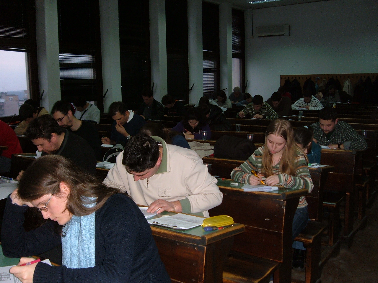 Prvenstvo Srbije u rešavanju sudokua 2009. godine